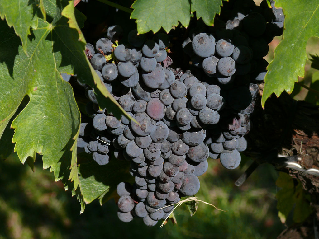 Montefalco Sagrantino grape